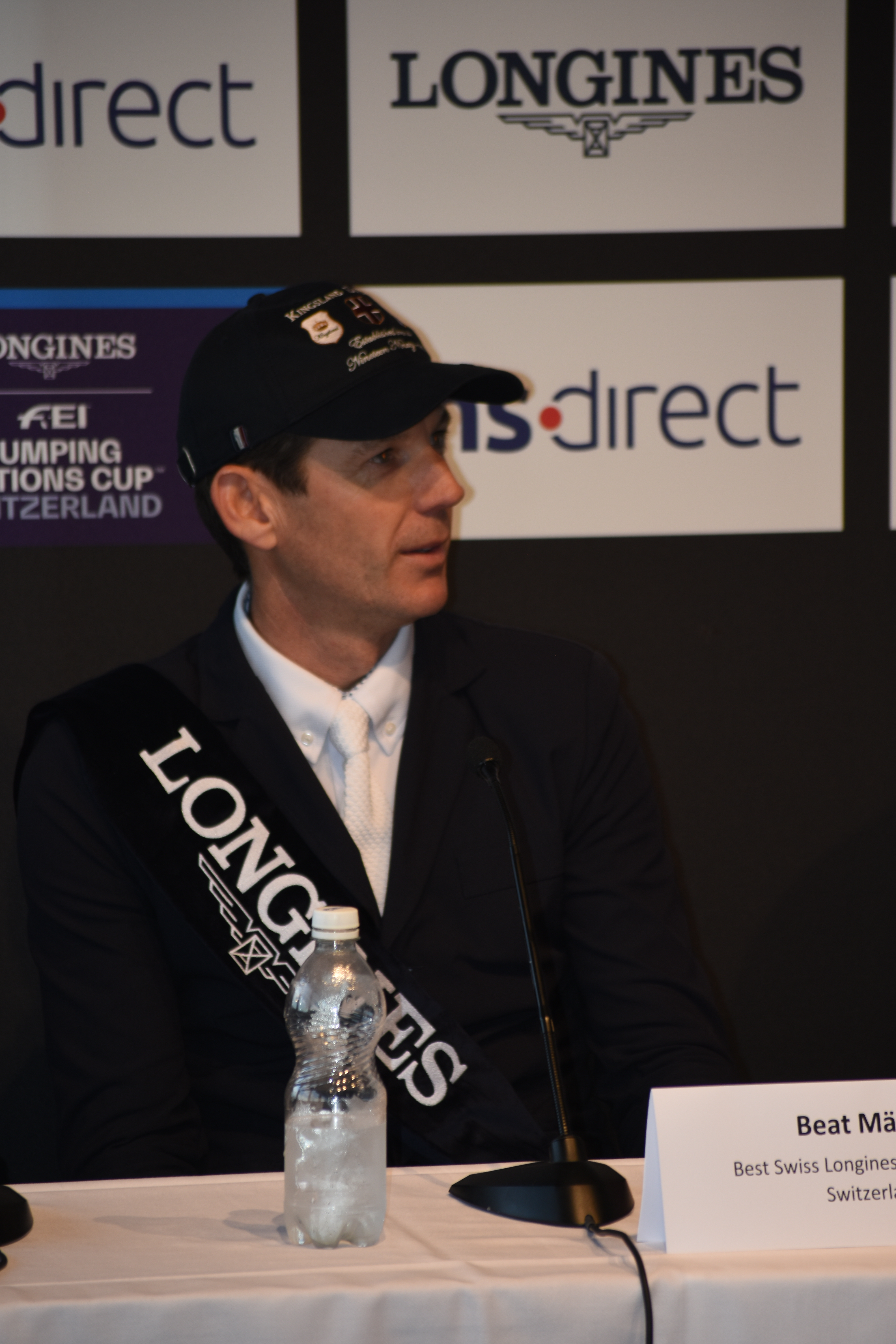 Beat Mändli wird zweiter im Grossen Preis der Schweiz 2018, Pressekonferenz